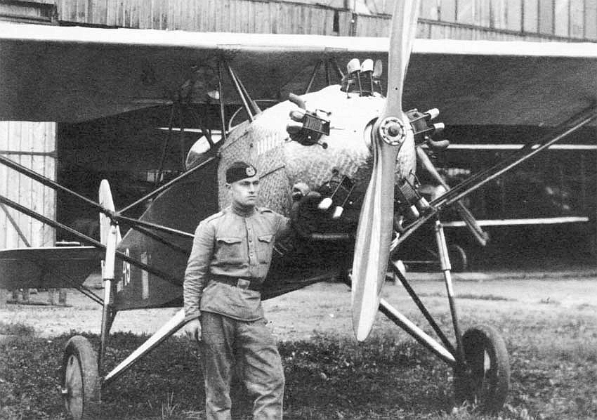 Litewski samolot szkolny ANBO-V.